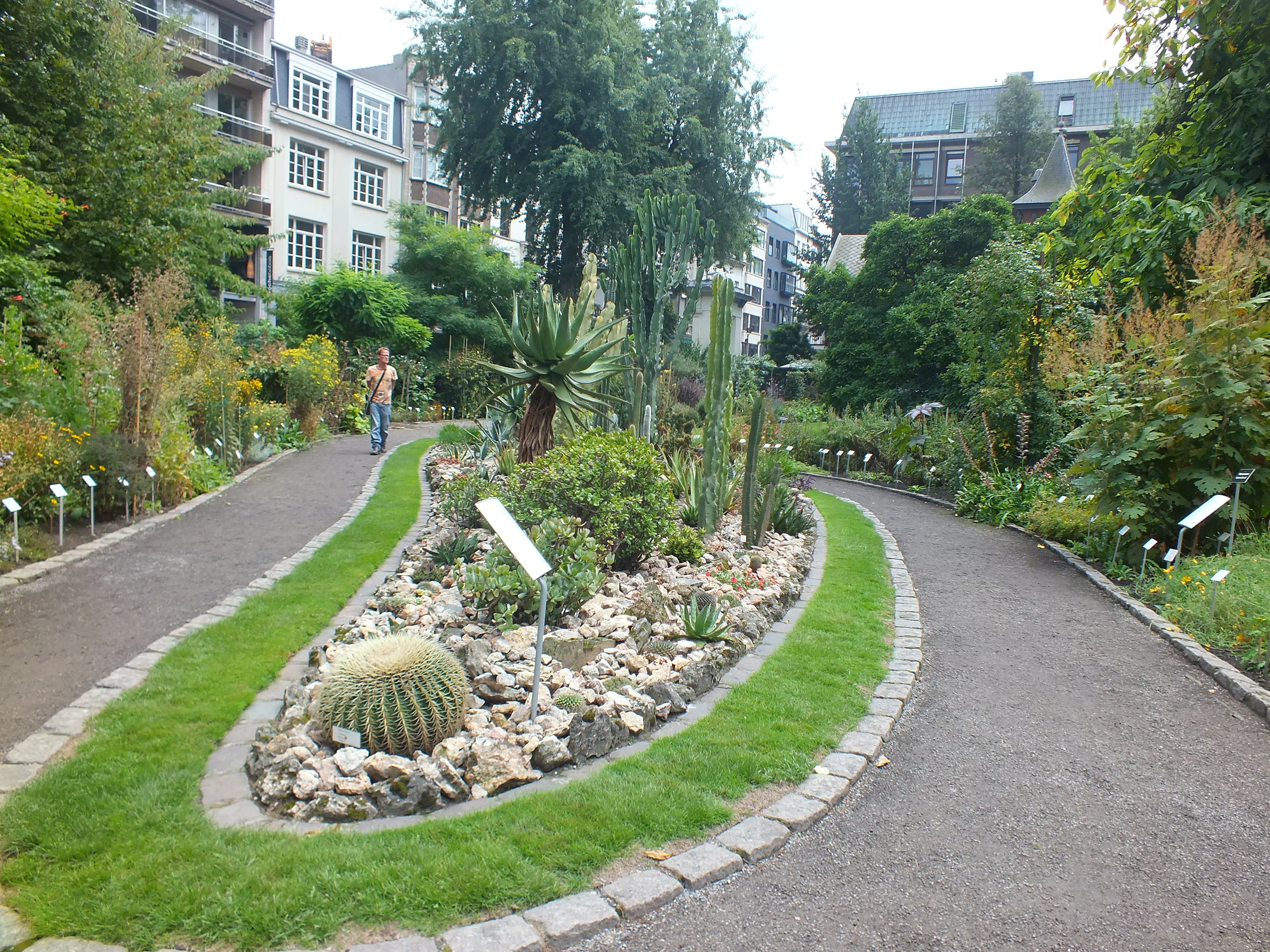 Plantentuin.